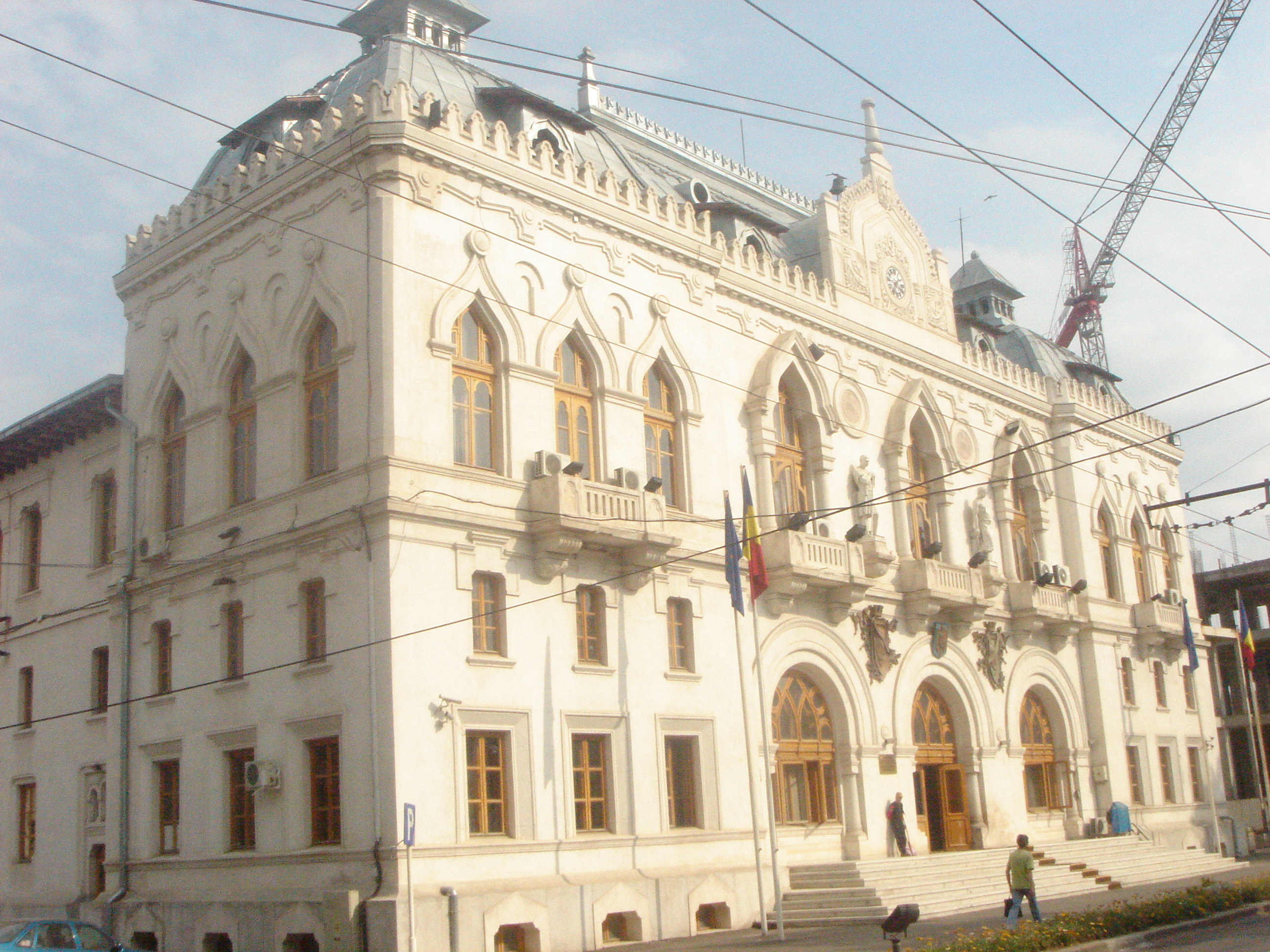 Palatul Administrativ din Galați. Clădirea-monument istoric a fost votată de către gălățeni ca fiind noul simbol al orașului. Edificiul a fost realizat după planurile arhitectului Ion Mincu. Pe partea frontală tronează două statui care simbolizează Industria și Agricultura.